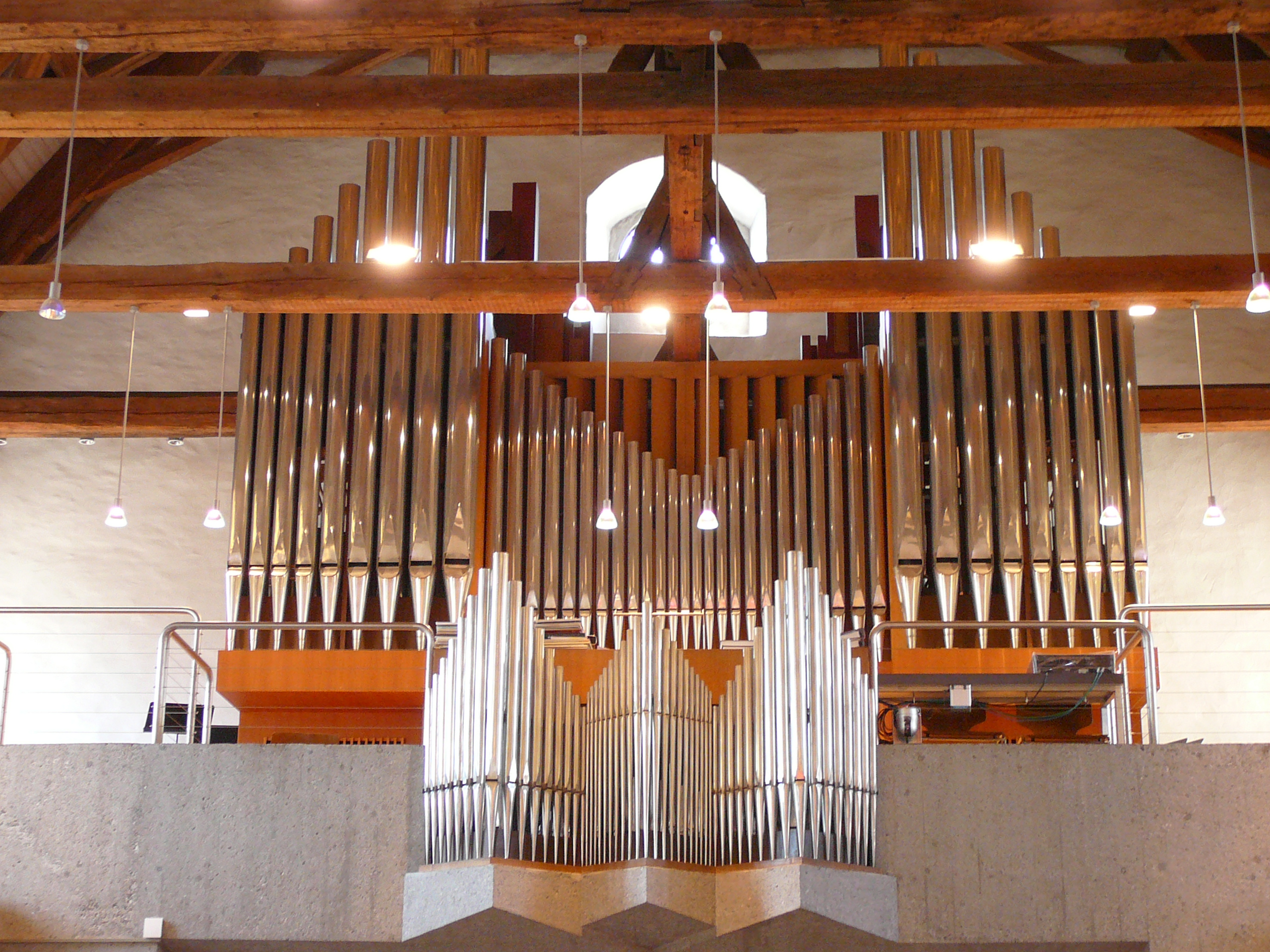 Reformierte Kirche Bülach, Orgel